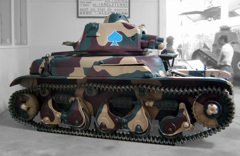 Renault R35 on display at the Musée des Blindés in Saumur.